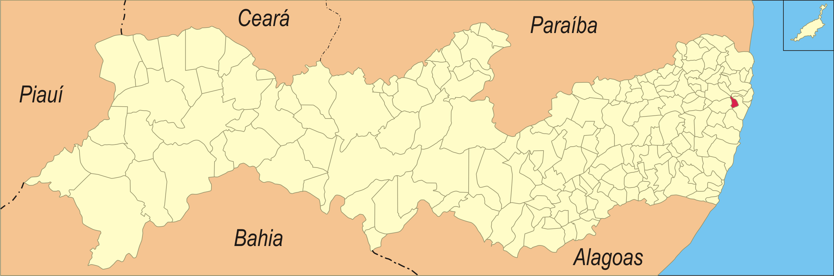 Localização da cidade em Pernambuco.